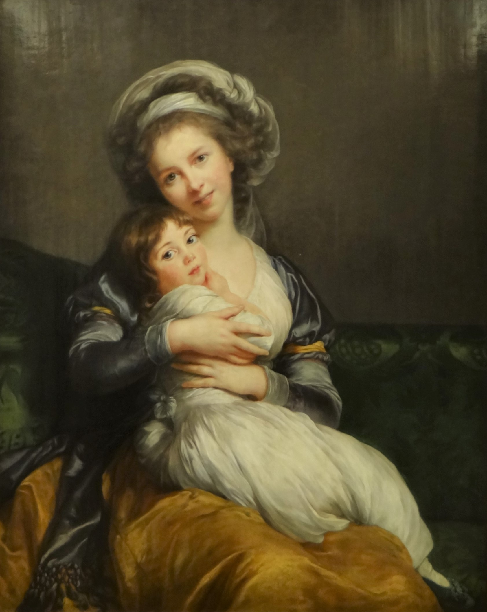 Madame Vigée Le Brun et sa fille, 1786, Elisabeth Louise Vigée Le Brun , musée du Louvre, Paris, huile sur toile, don de Mme Tripier le Franc suivant le voeu de sa tante Mme Vigée Le Brun, 1843, INV 3069